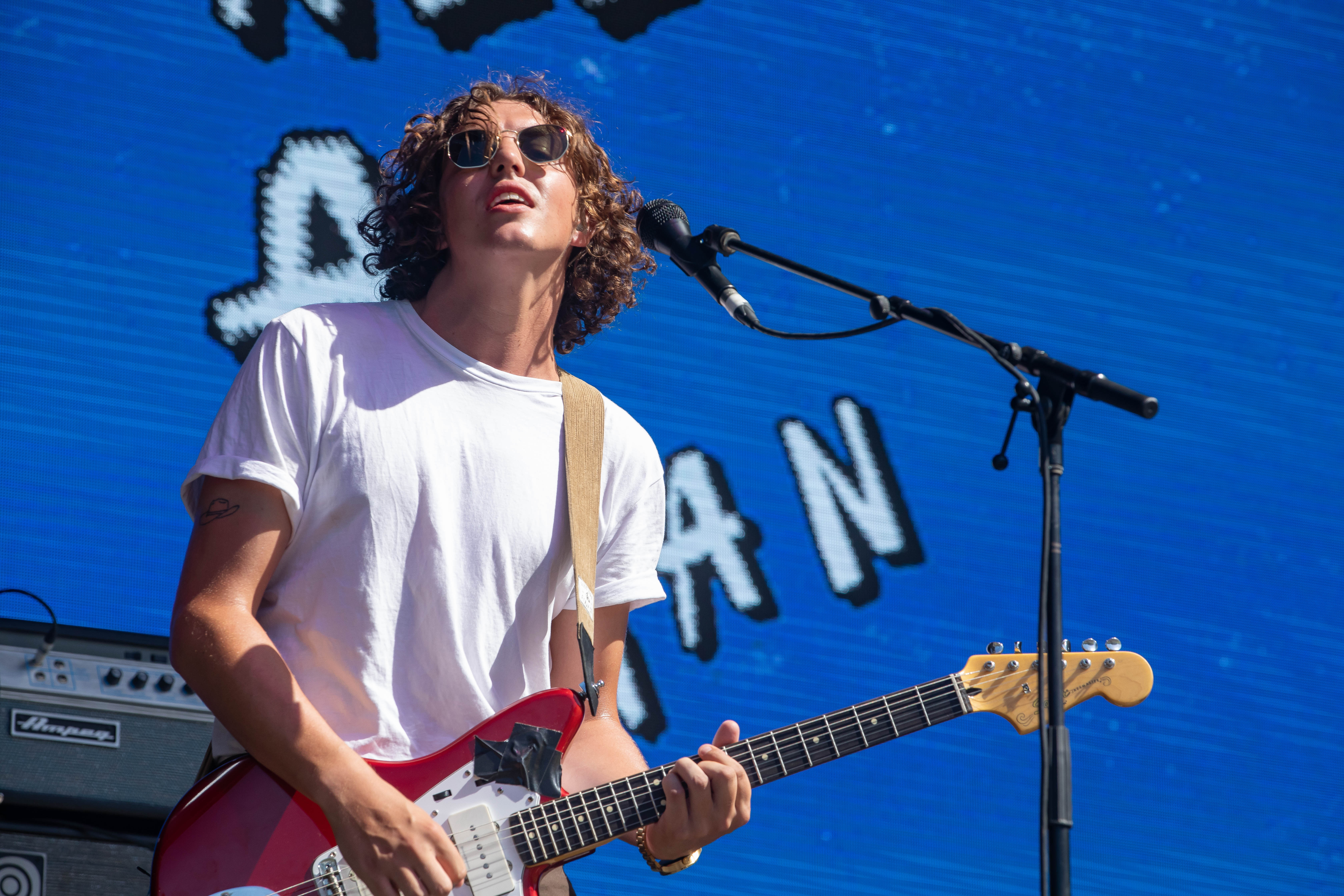 Hockey Dad